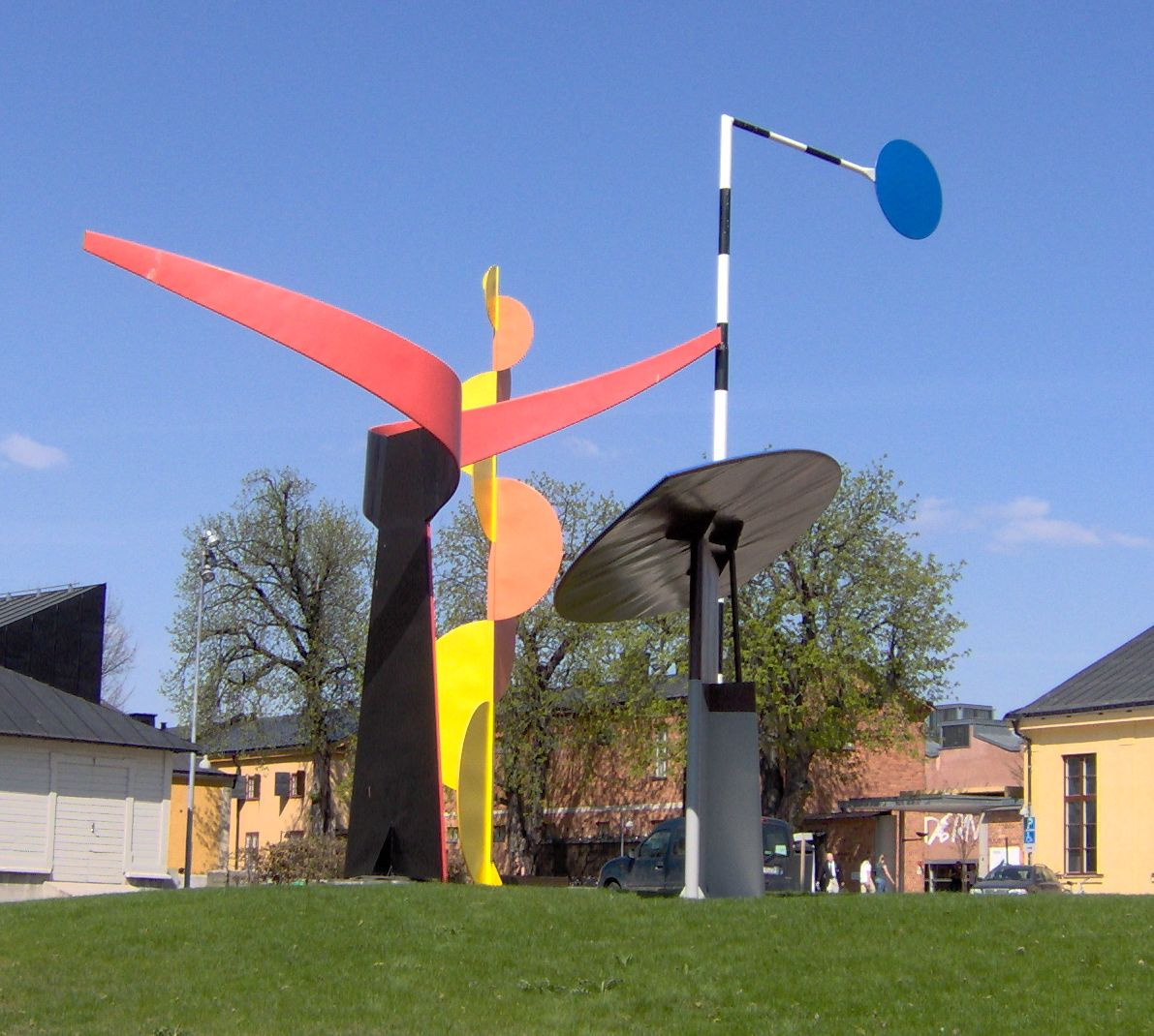 Mobilt konstverk utanför Moderna museet i Stockholm 2006. Mobile modern art outside the modern art museum in Stockholm Sweden.